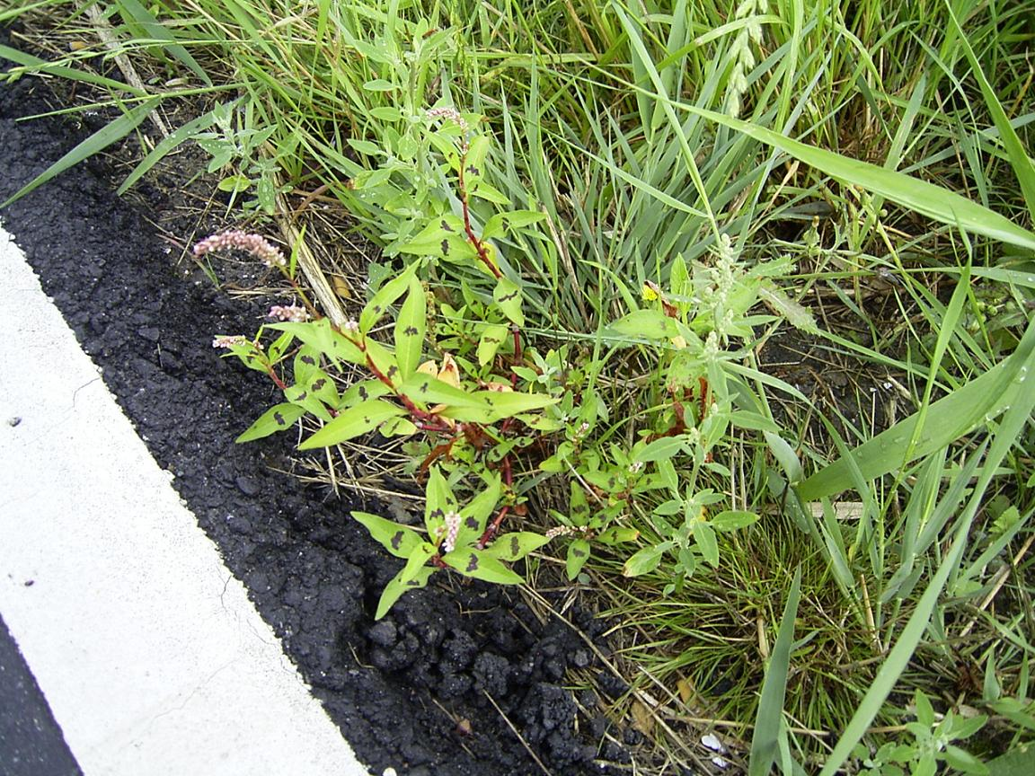 Persicaria maculosa (syn. Polygonum persicaria), Gouda, augustus 2004